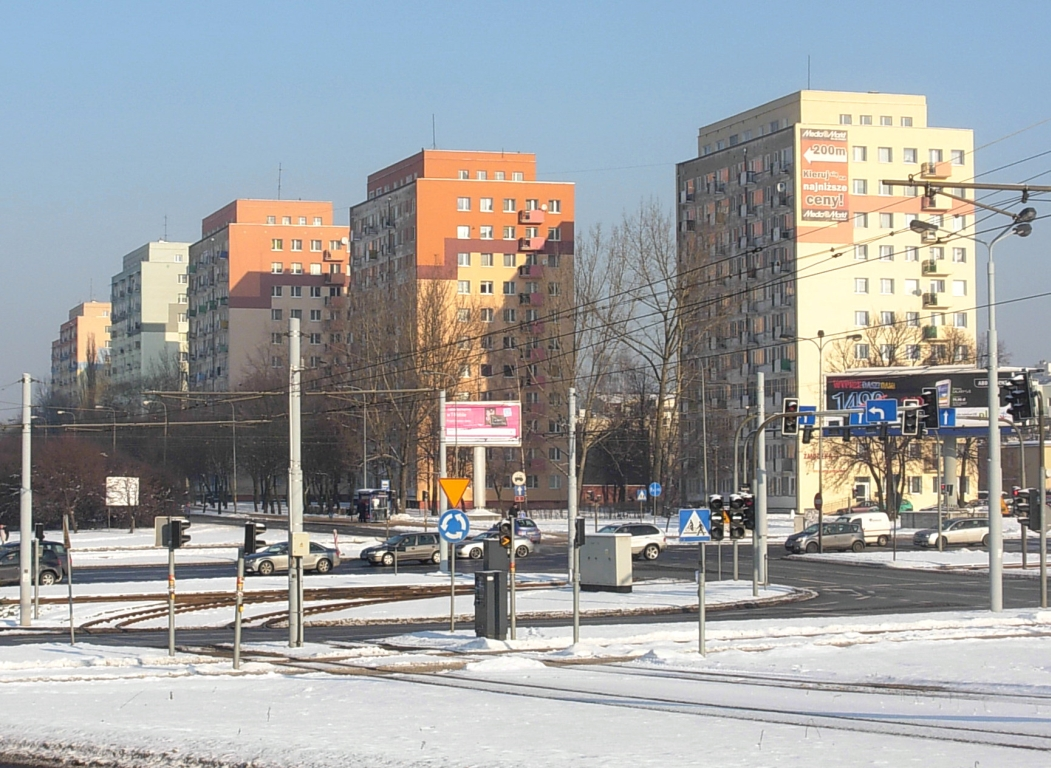 Zabudowa przy al. Stefana Wyszyńskiego w Bydgoszczy